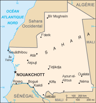 Carte de la Mauritanie Source : CIA World Factbook site (traduite et complétée) D'après un téléchargement de Utilisateur:Rinaldum